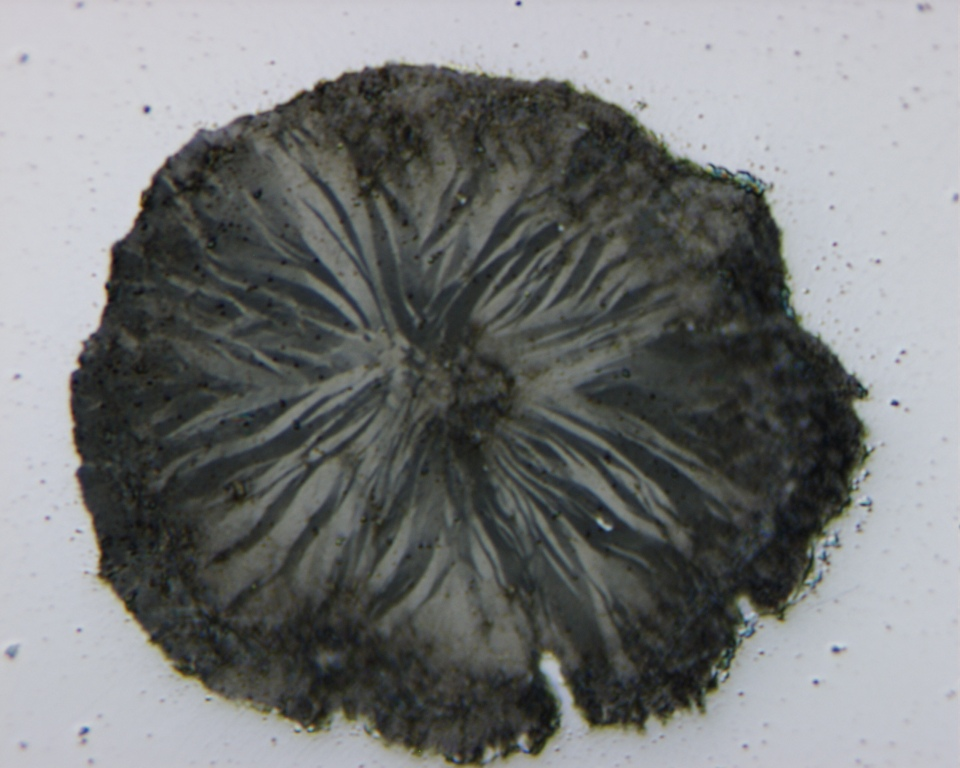 Gusseisen mit Kugelgraphit: Grafitkugel im Gusseisen (GJS), polarisiertes Licht, V=1000:1